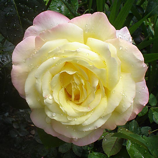 Madame A.Meilland